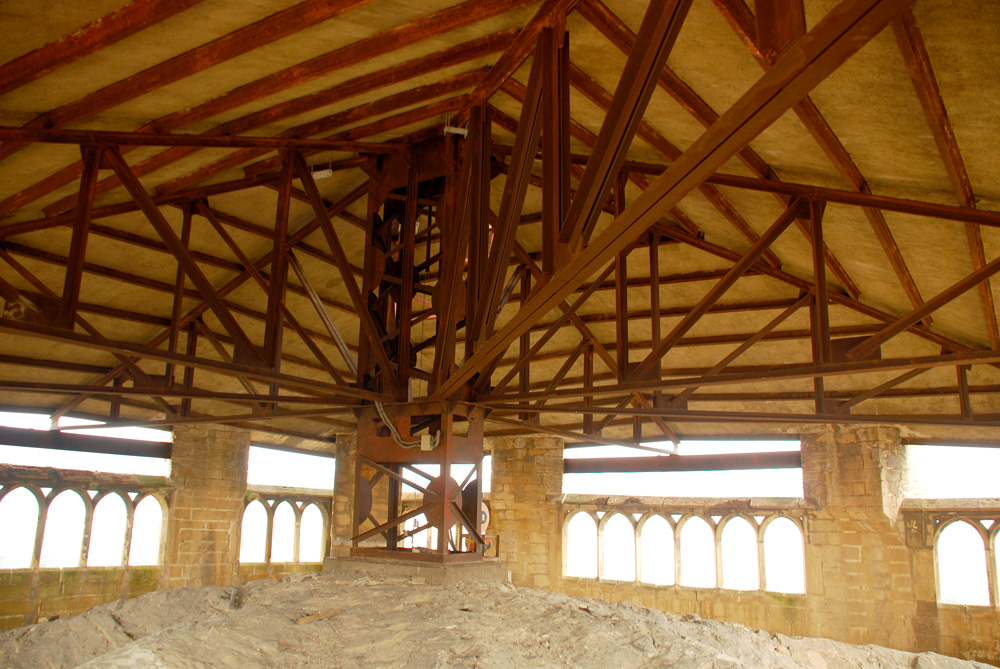 cubierta capilla barbazana